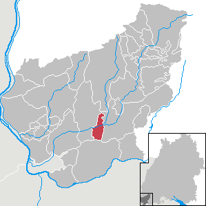 Maulburg, Landkreis Lörrach, Baden-Württemberg